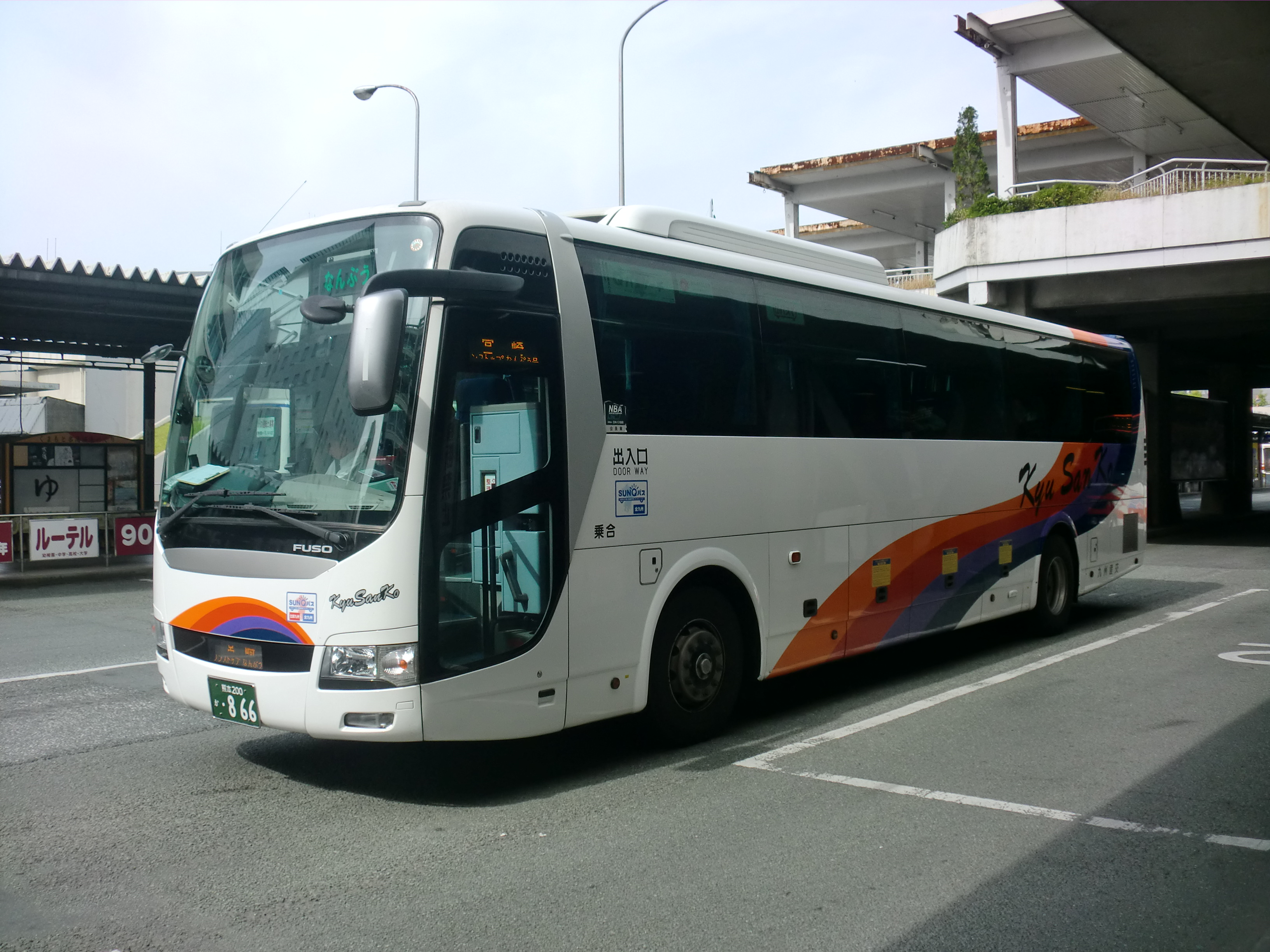 九州産交バス高速バス熊本-宮崎線